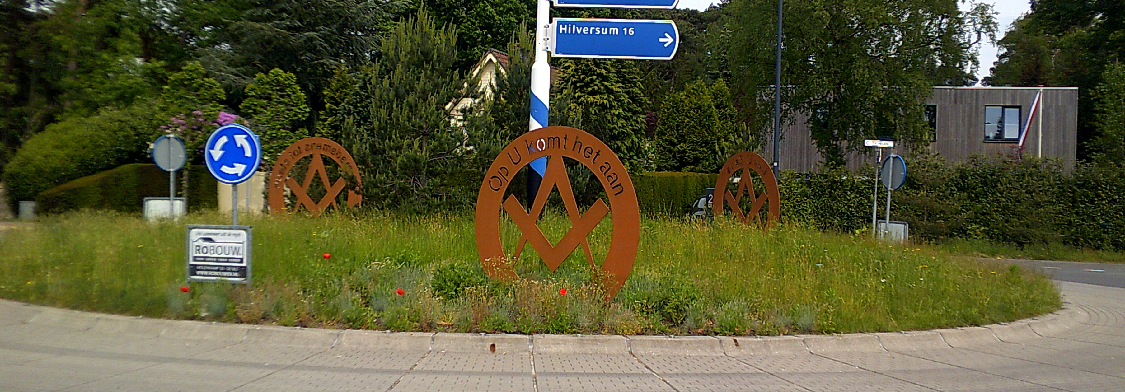 Maçonniek symbool op een rotonde in Bilthoven